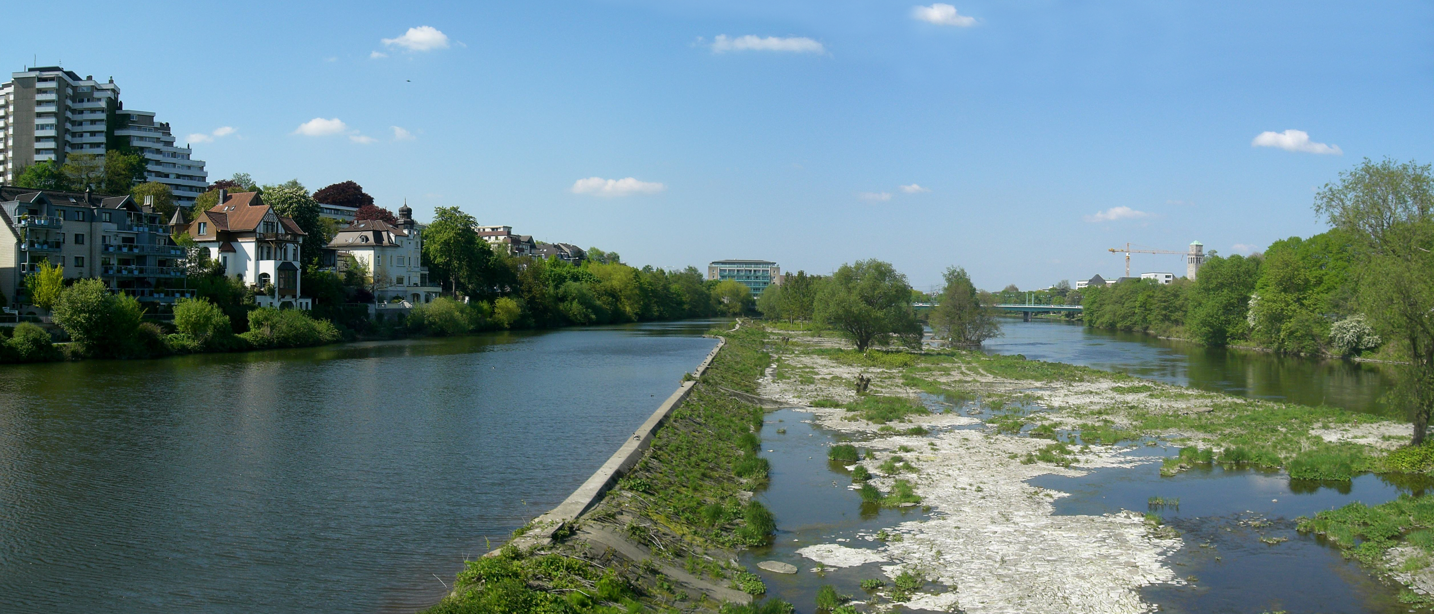 Ruhrschlagd Broich in Mülheim